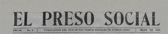 Tapa del Preso Social, peridico anarquista